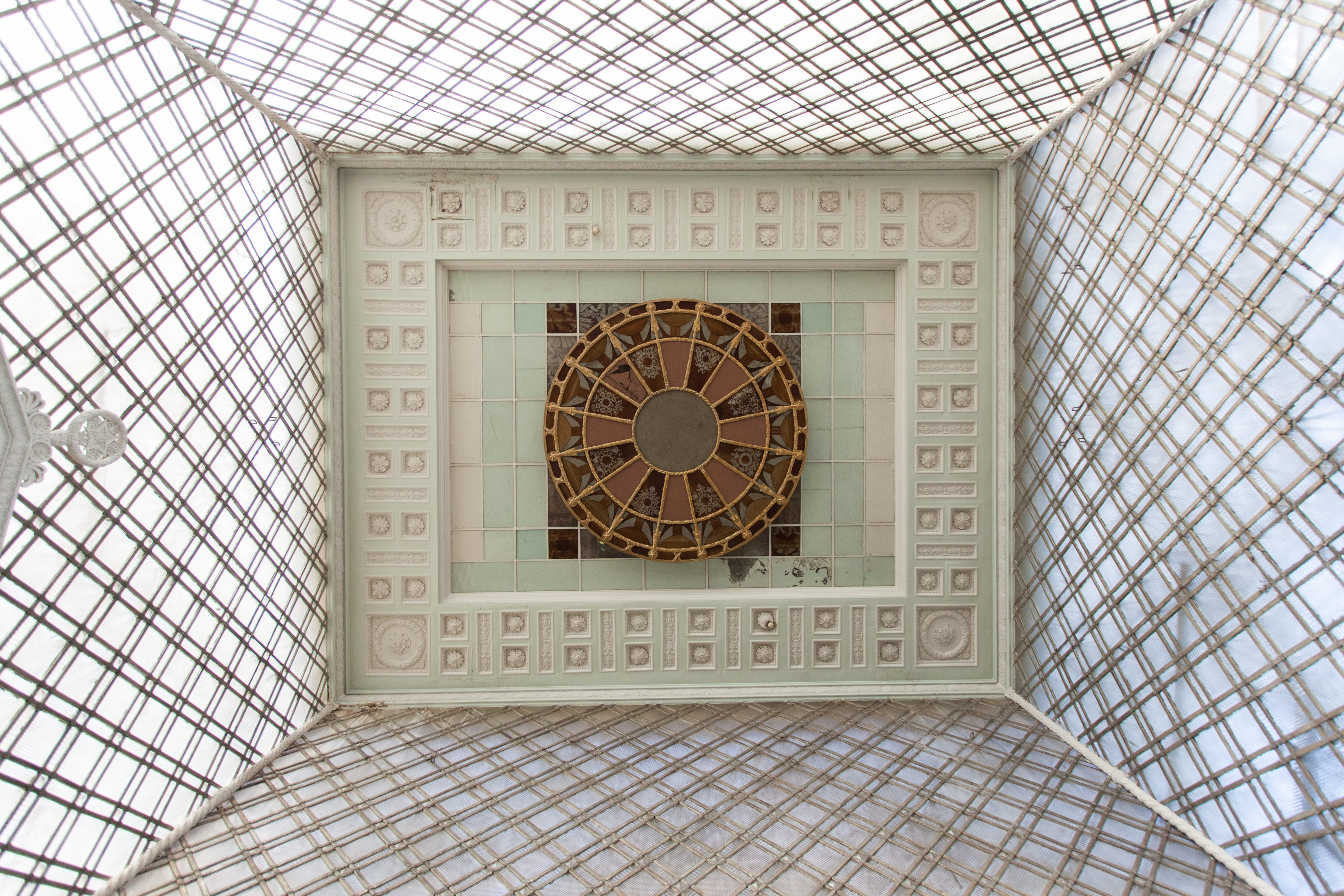 ВДНХ, павильон 62. Вид вверх на потолок стеклянного куба